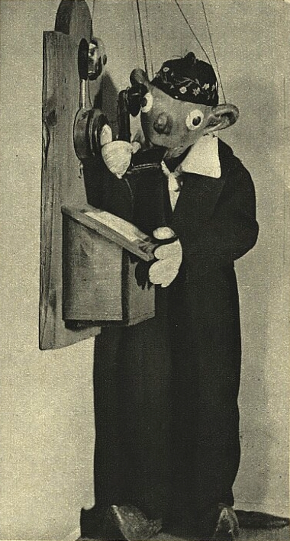 Spejbl v prvním zvukovém filmu, Spejblovo filmové opojení, 1931